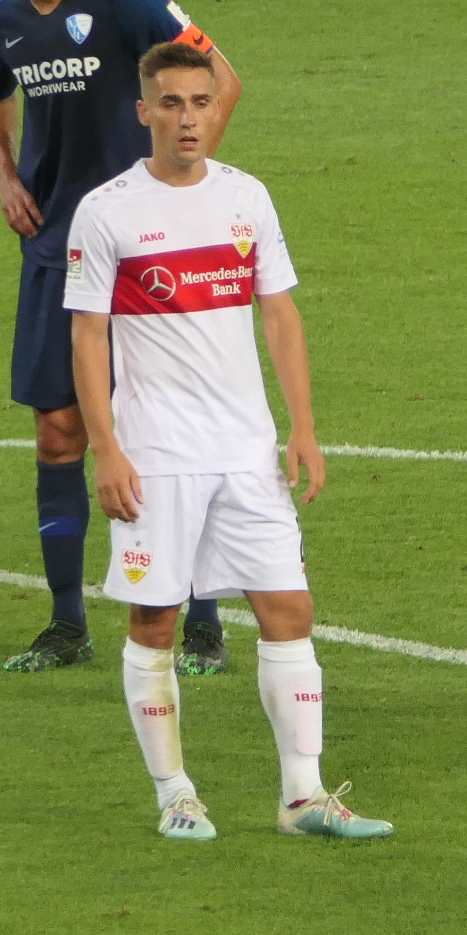 Der Fussballprofi Philipp Klement im Trikot vom VfB Stuttgart beim Heimspiel gegen den VfL Bochum am 02.09.2019.